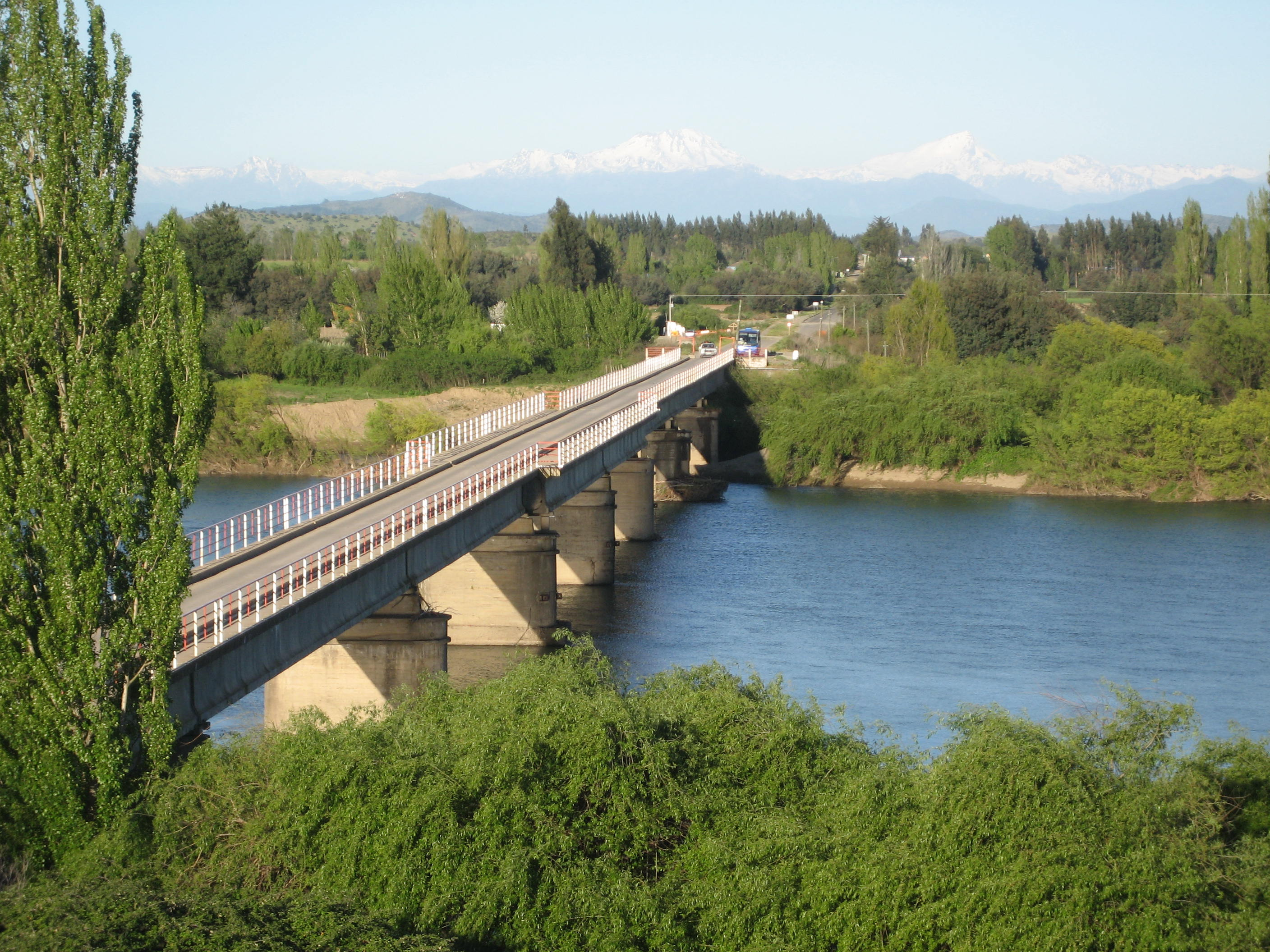 Chile, Linares, Rio Loncomilla. Puente Sifon. El puente es un aqueducto.